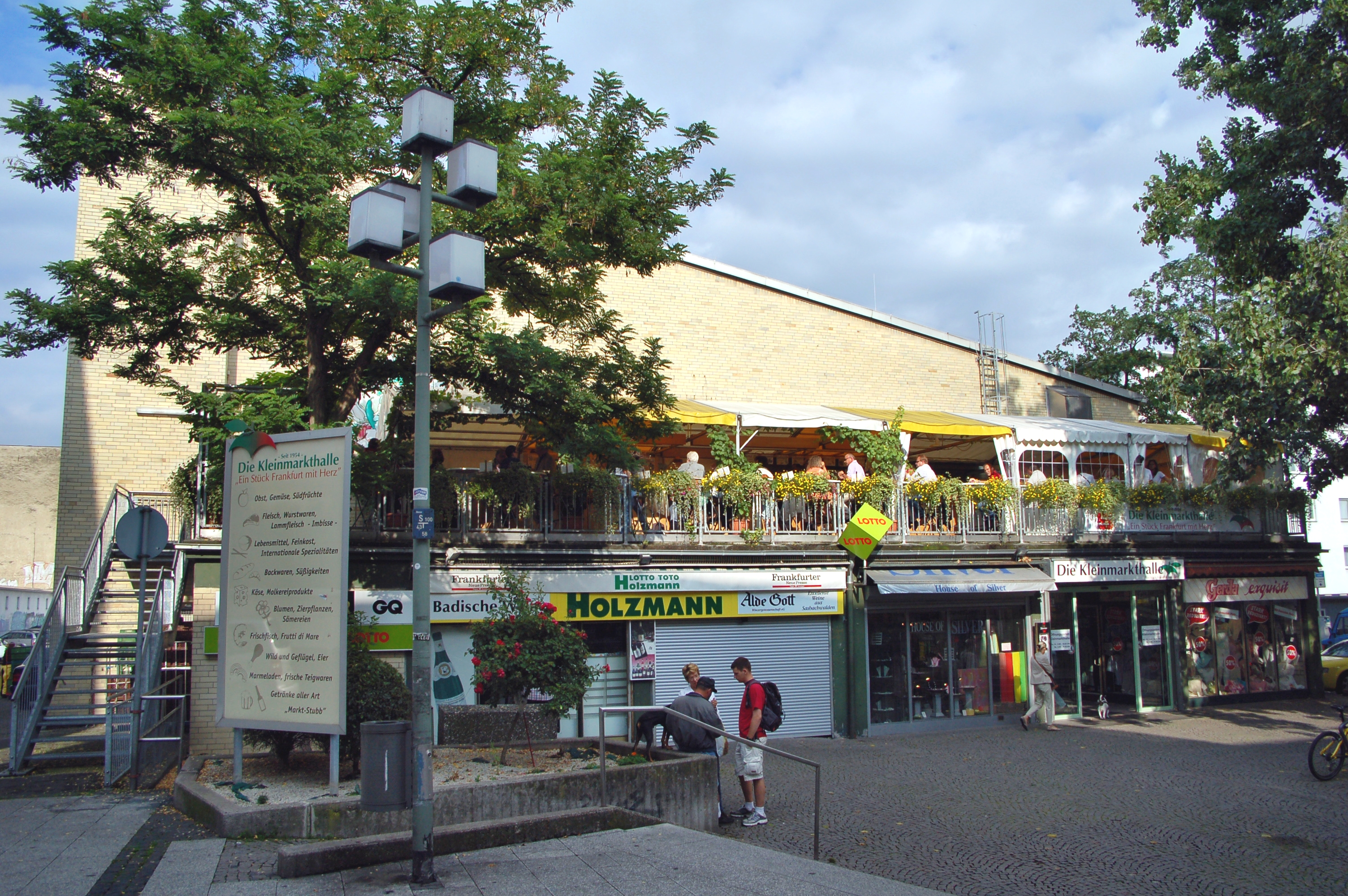 Westeingang der Kleinmarkthalle Frankfurt